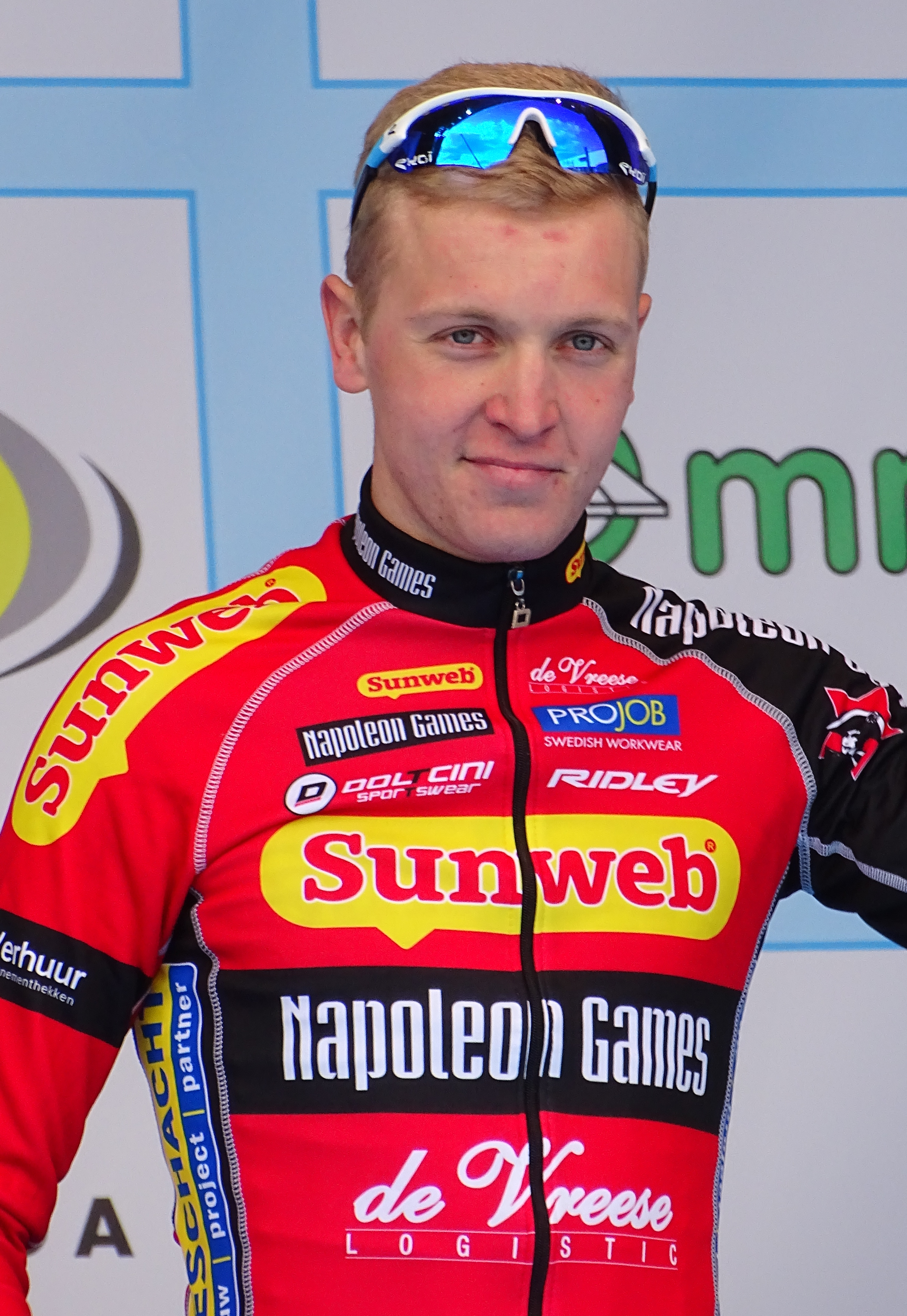 Reportage réalisé le vendredi 27 mars à l'occasion du départ et de l'arrivée du Grand Prix E3 2015 à Harelbeke, Belgique.